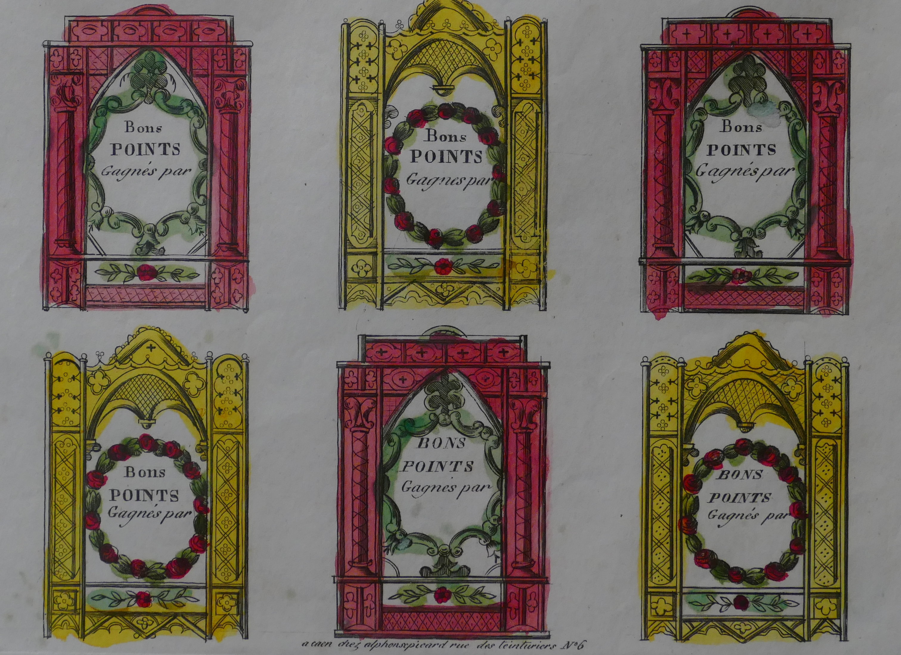 Planche de Bons Points (détail d'une planche de 15 bons points). Lithographie aquarellée imprimée par Alphonse Picard, Caen. Musée national de l'éducation (Rouen).